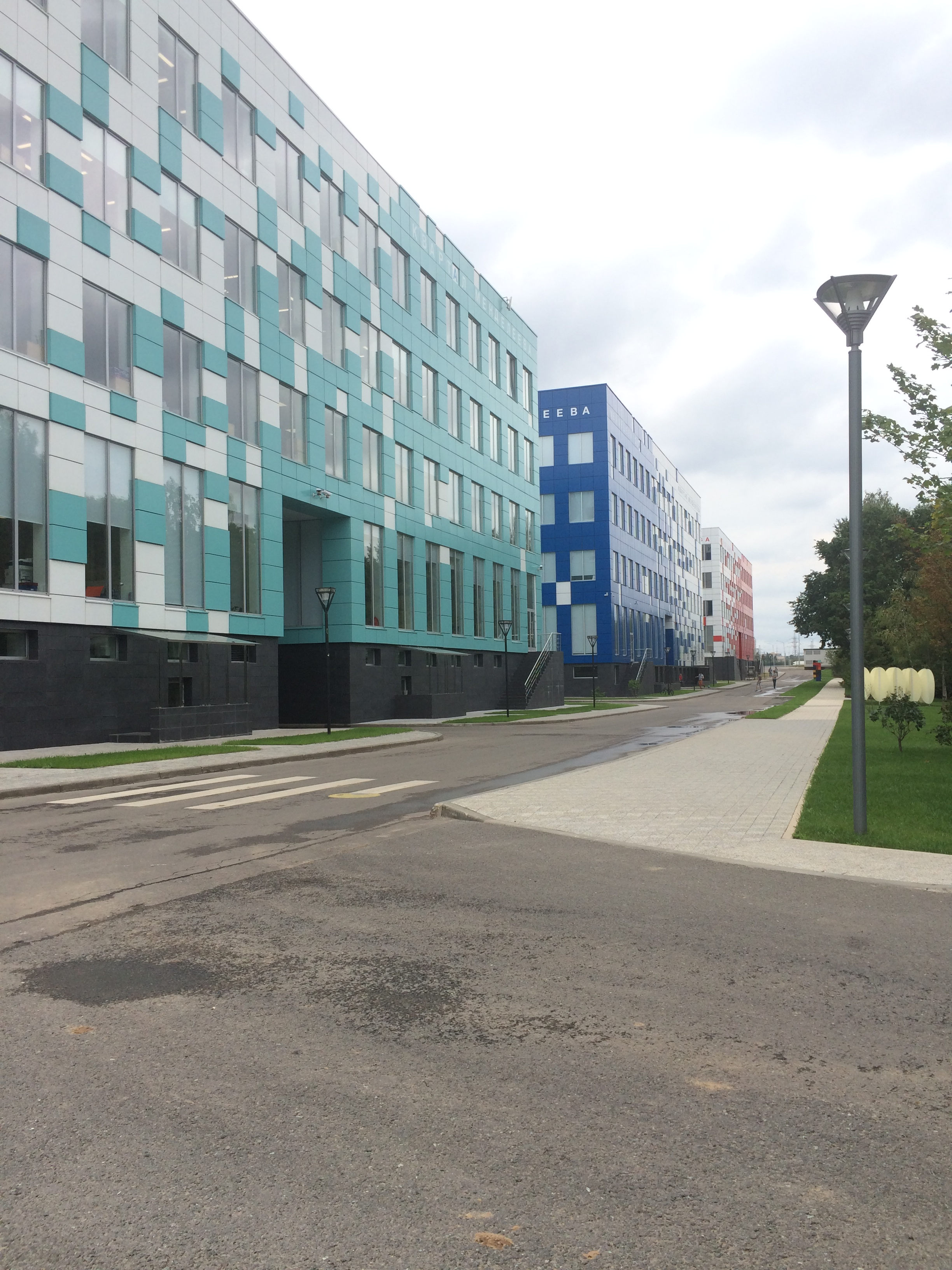 Квартал Менделеева в ИЦ «Сколково», 24 августа 2016 года.